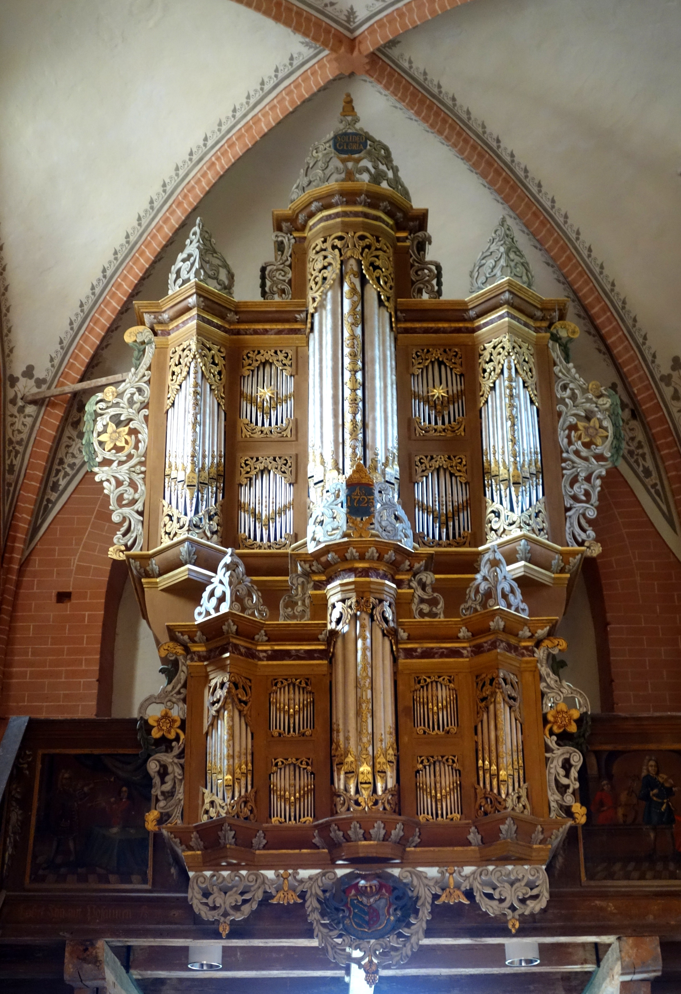 Johanniter-Kirche Groß Eichsen, Landkreis Nordwestmecklenburg, Mecklenburg-Vorpommern, Deutschland